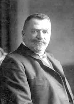 Der preussische Beamte (Landrat und Polizeipräsident) Ernst von Stubenrauch (1853-1909)